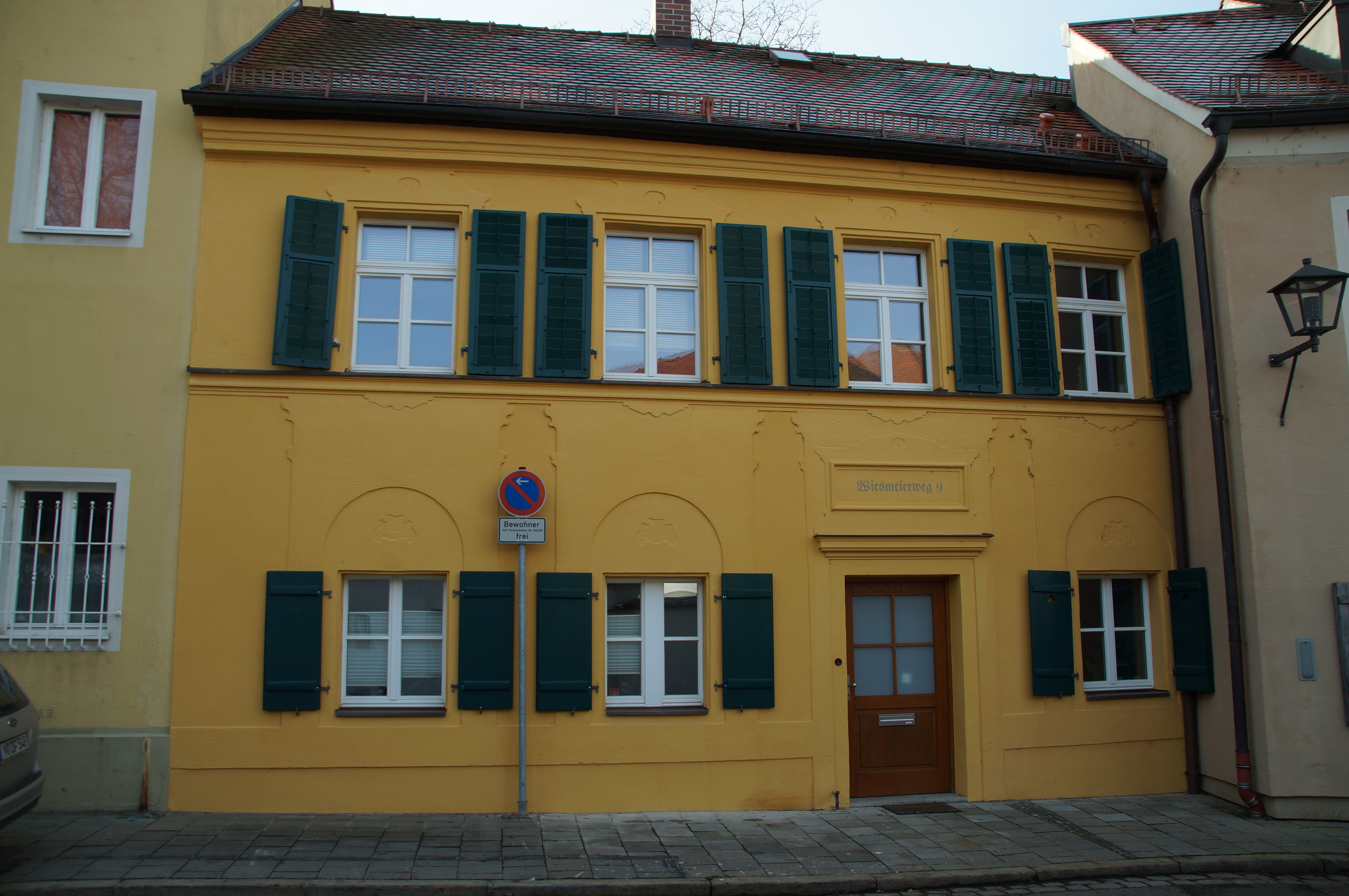 Wohnhaus, zweigeschossiger und traufständiger Satteldachbau, historistisch, 1862 von Adolph Herbst, Westfassade mit Erker von 1926; im Garten Fundament eines Zwingerturms und ein Stück der Zwingermauer. This is a photograph of an architectural monument.